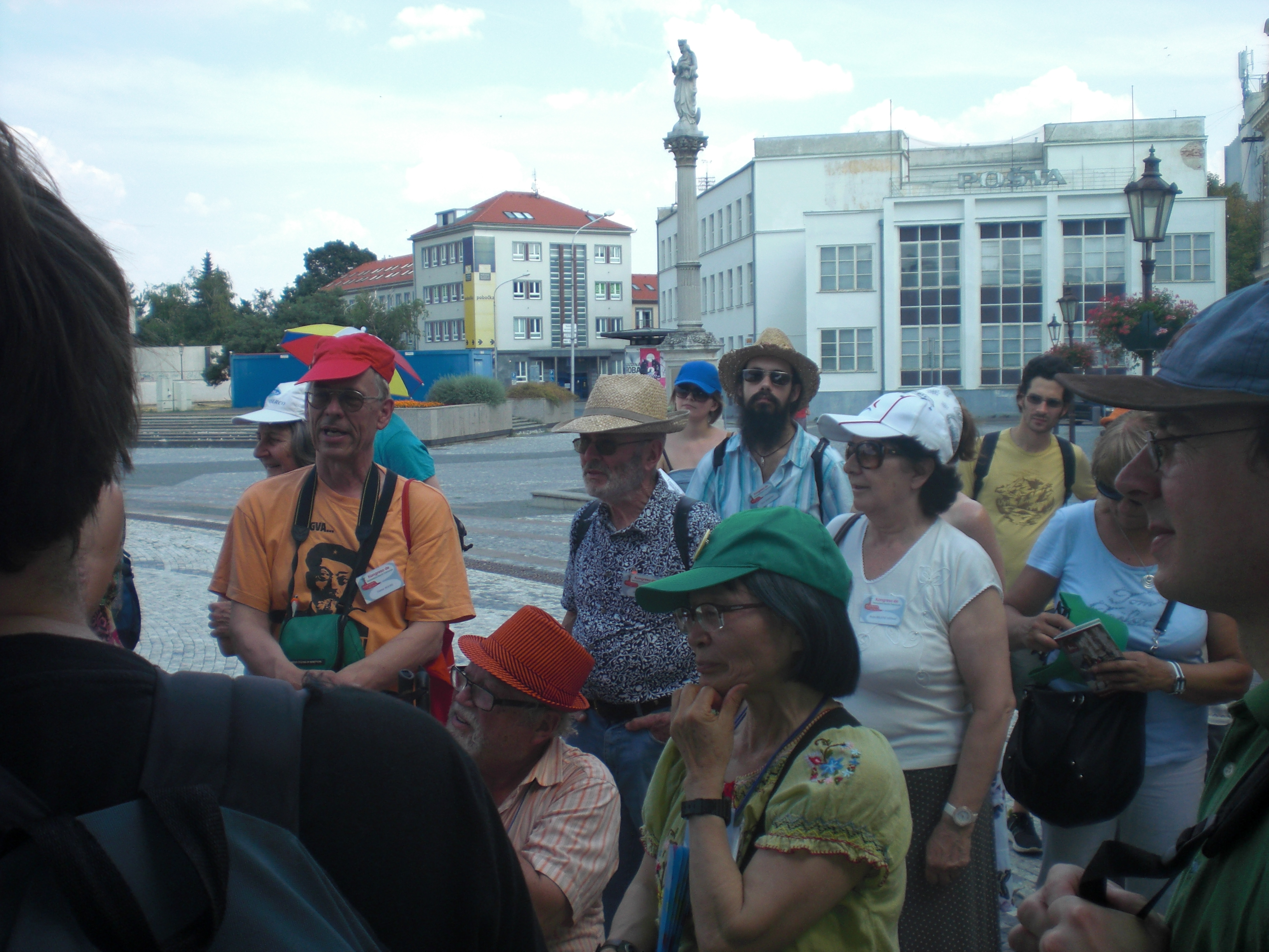 kongresanoj tra Nitra